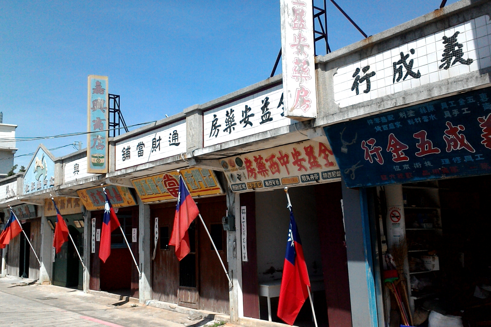 陽翟聚落軍中樂園場景,福建省金門縣金沙鎮光前里